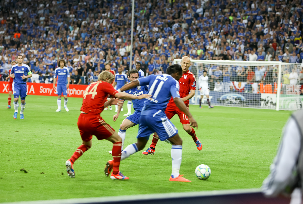 RA1_6050